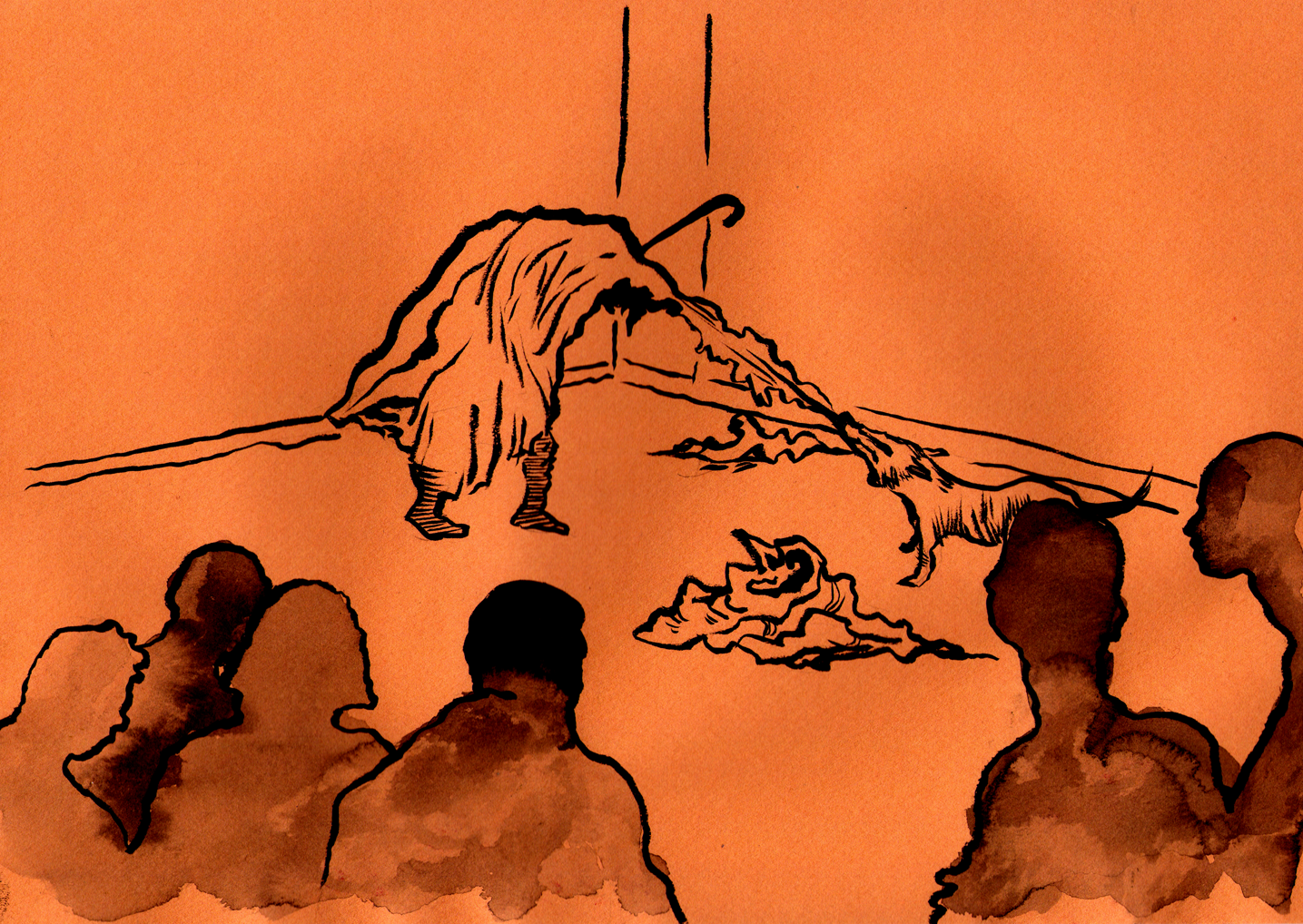 Recreació il·lustrada d'una escena de l'acció fluxus de Joseph Beuys "I Like America and America Likes Me" l'any 1974 a Nova York. Beuys va ser traslladat des de l'aeroport en una ambulància a la Galeria d'art on va estar 3 dies en companyia d'un coiot, sense haver vist res més d'Amèrica ni haver trepitjat cap altre sòl americà que el de la galeria.